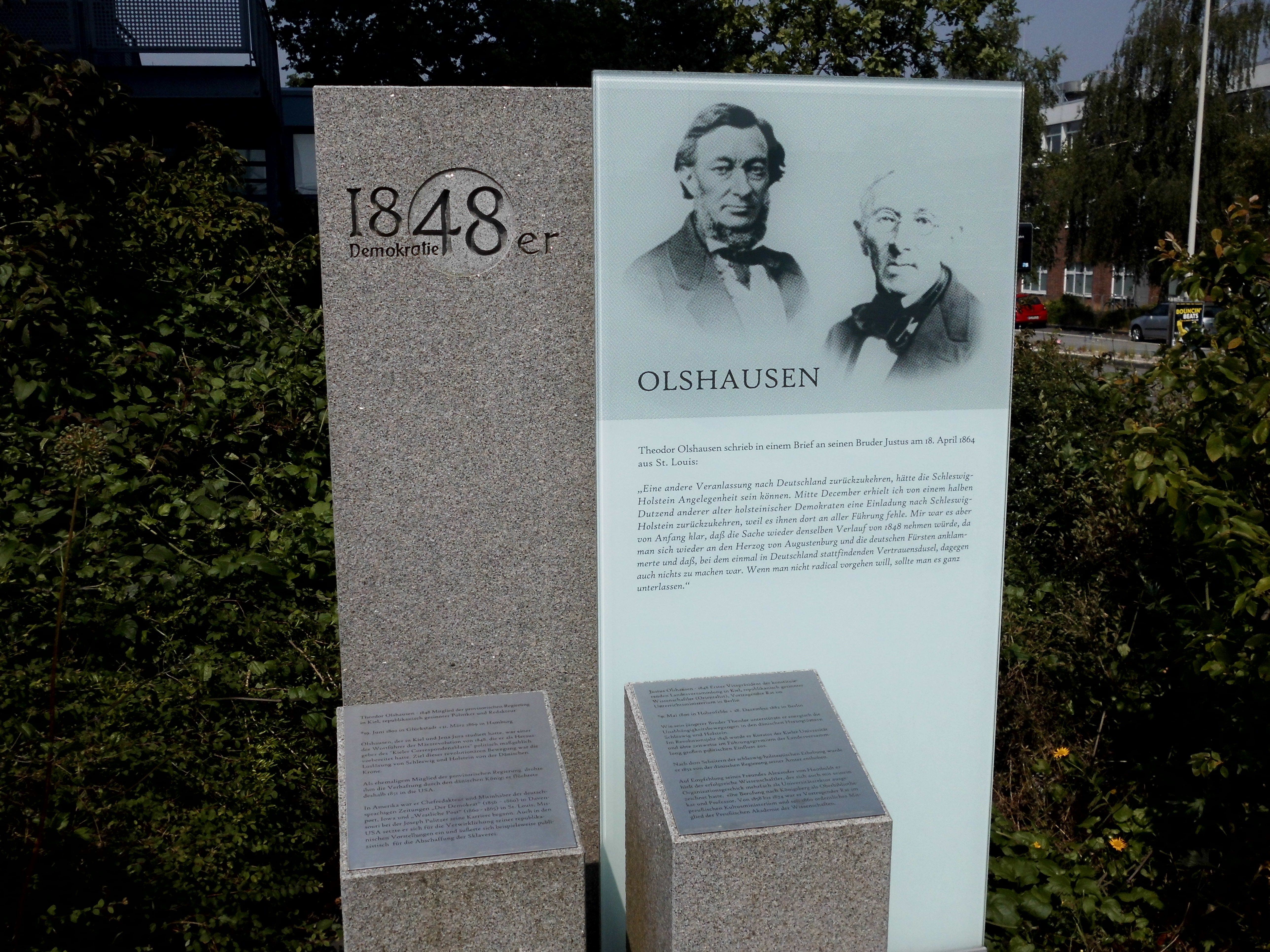 Infostele "Olshausen" im Kieler Stadtteil Ravensberg.